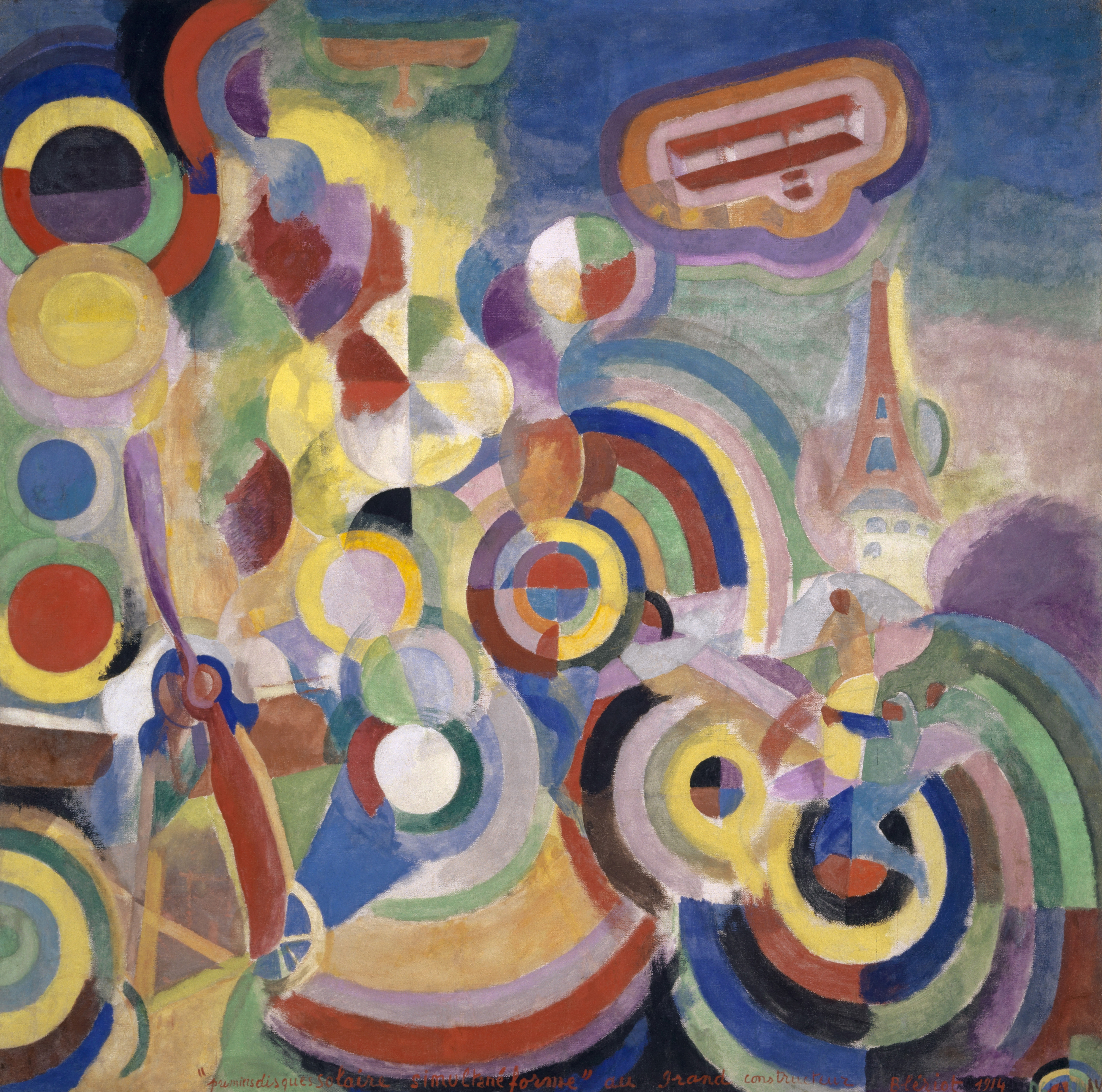 Robert Delaunay: Hommage à Blériot, 1914, Leimtempera auf Leinwand, 250 x 250 cm, Kunstmuseum Basel